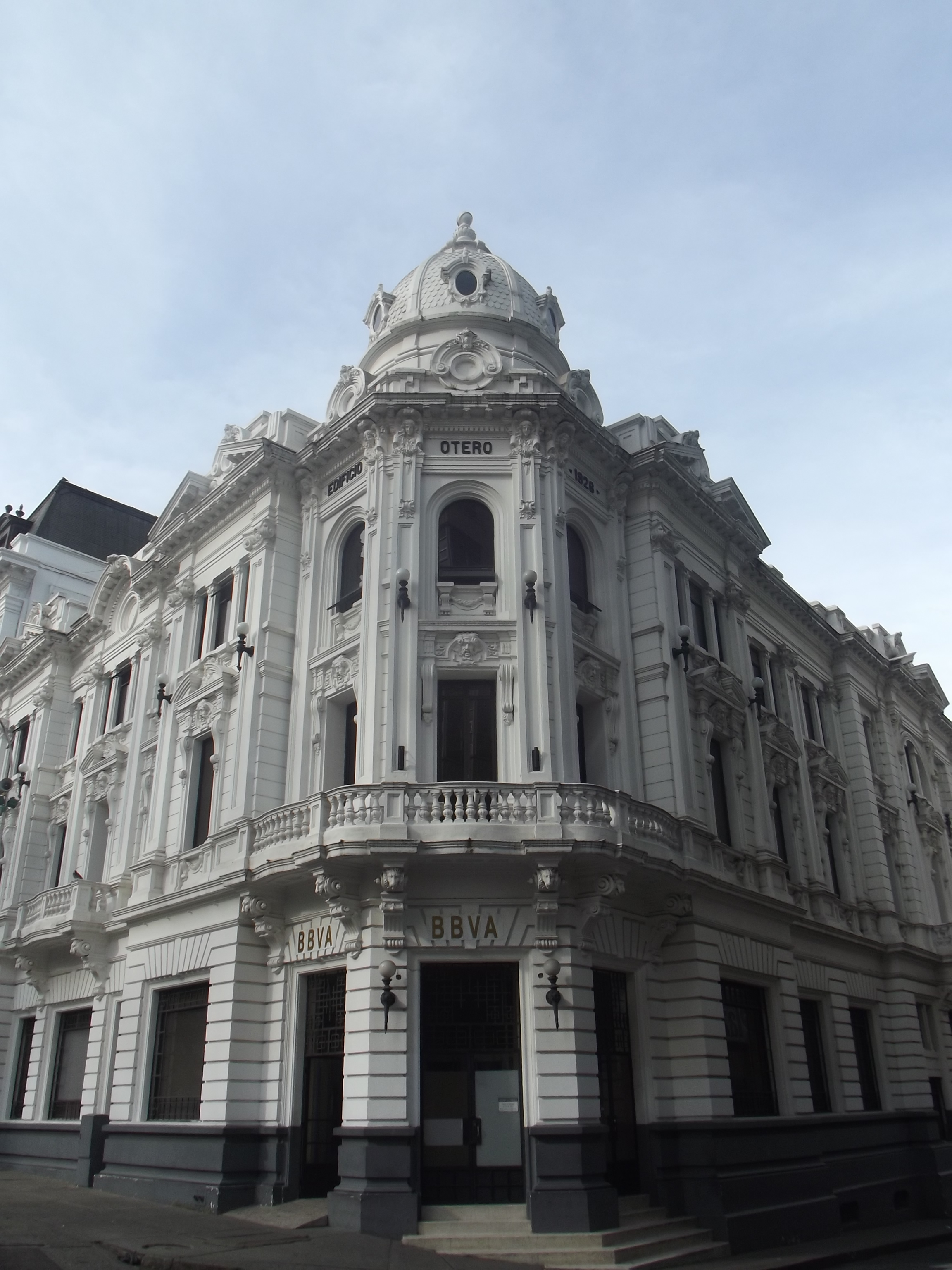 Edificio Otero